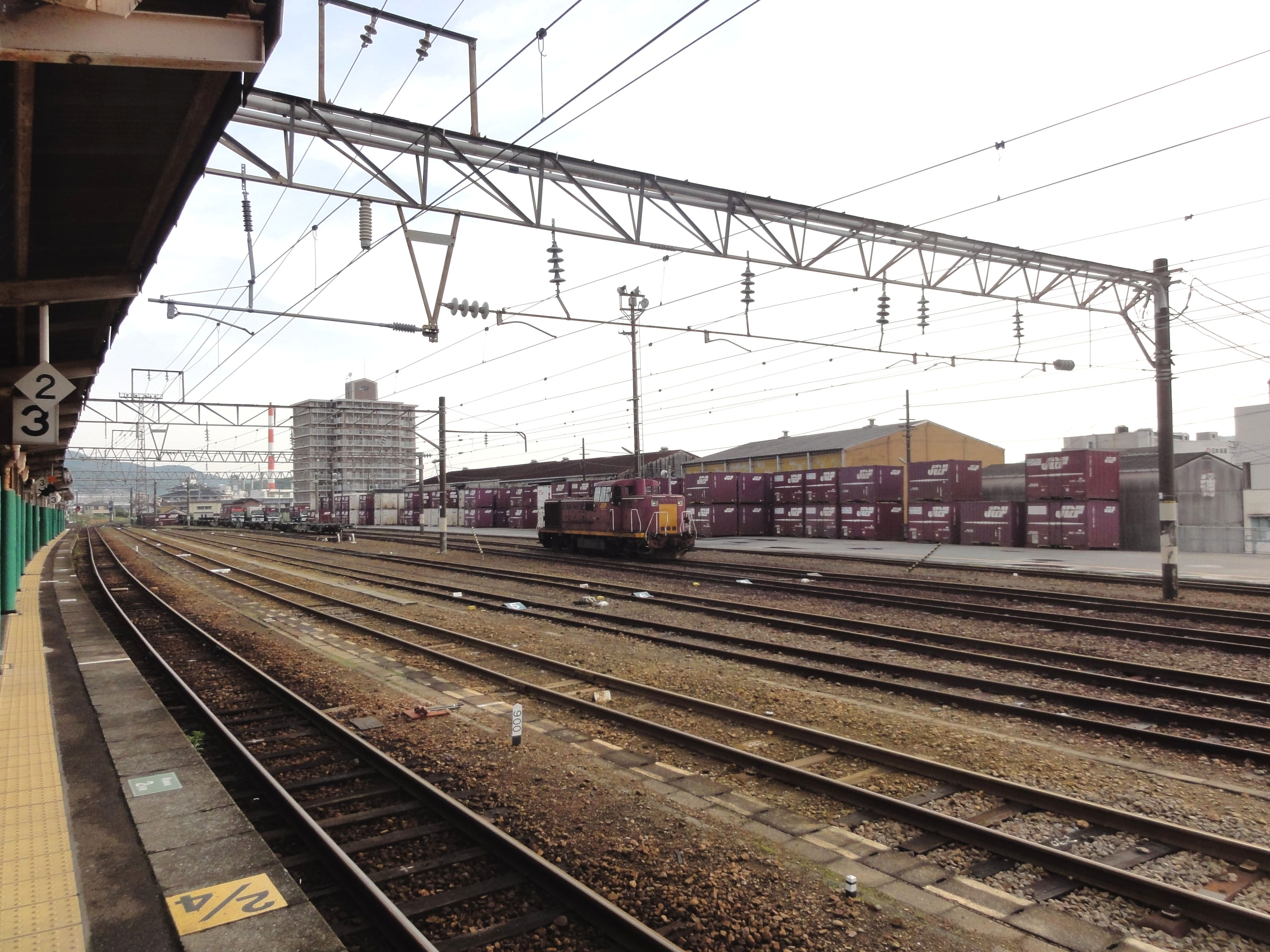 JR貨物延岡駅